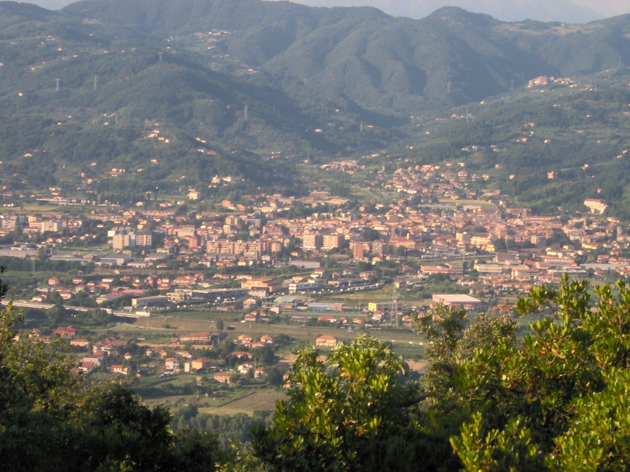 Sarzana - Panorama della piana visto dal Monte Caprione